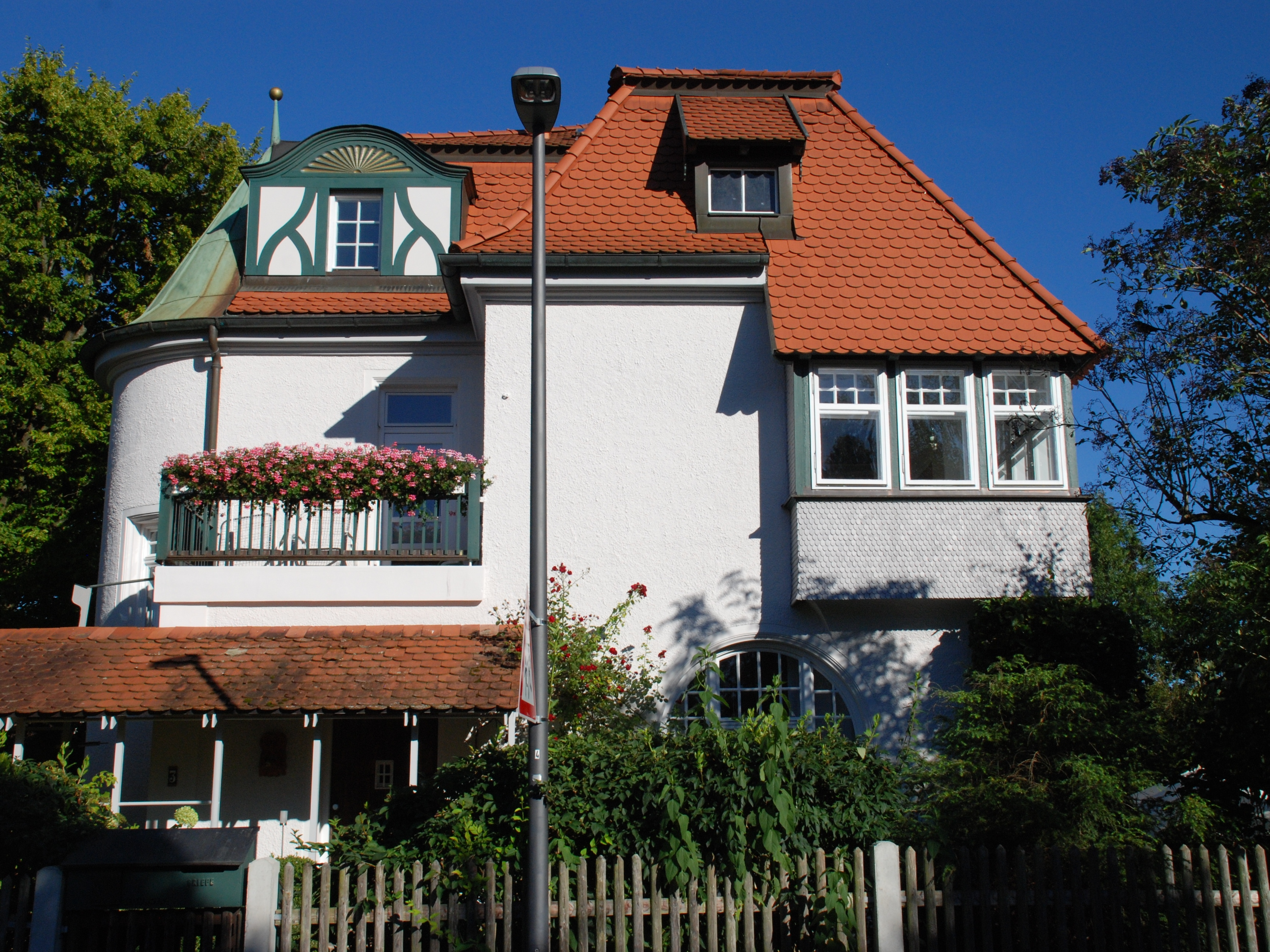 Haus in der Kurt-Huber-Straße 3 in Gräfelfing, Landkreis München, Regierungsbezirk Oberbayern, Bayern. Als Baudenkmal in der Bayerischen Denkmalliste aufgeführt. Laut Denkmalliste um 1900 erbaut.